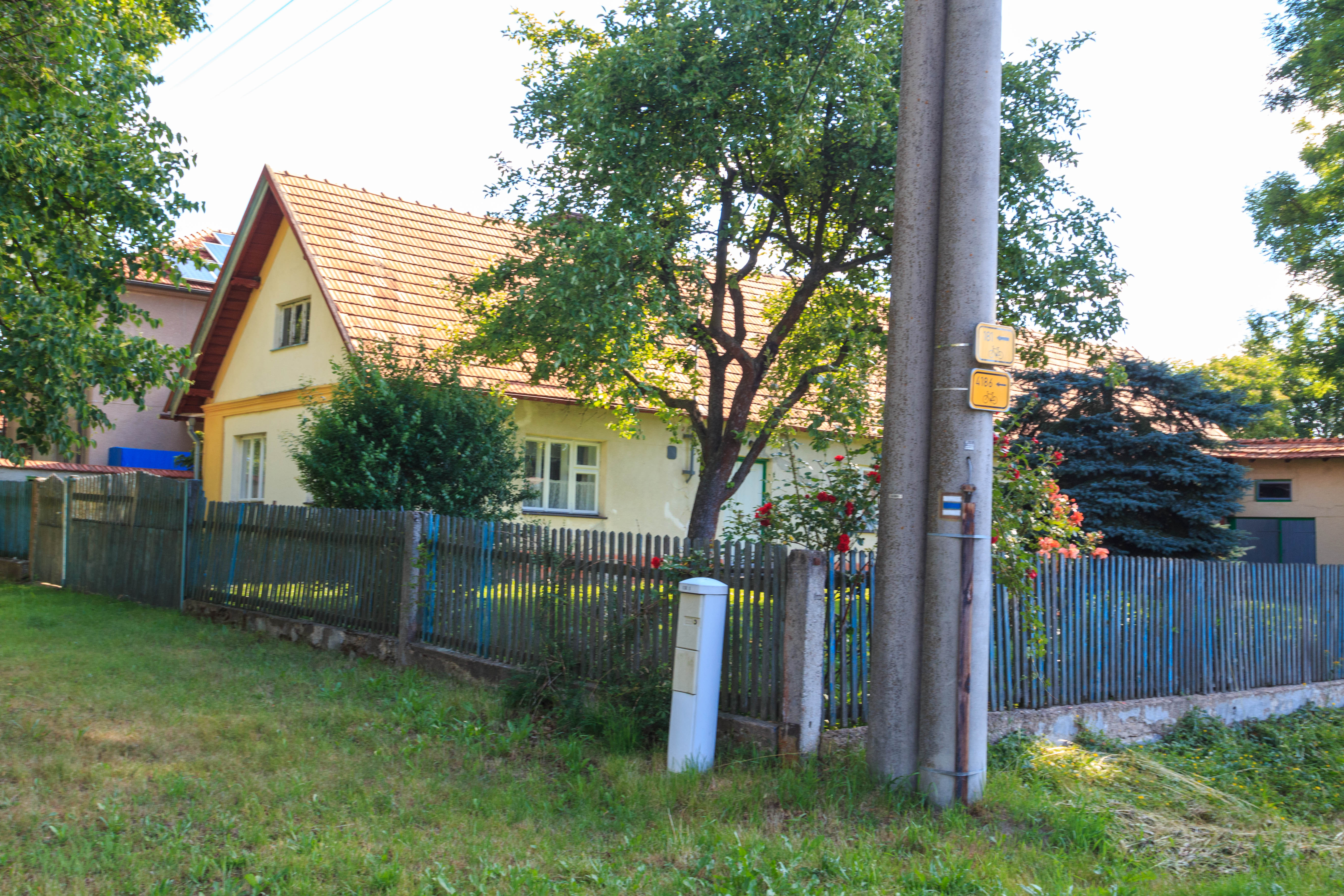 Rousínov u Horního Jelení čp. 2